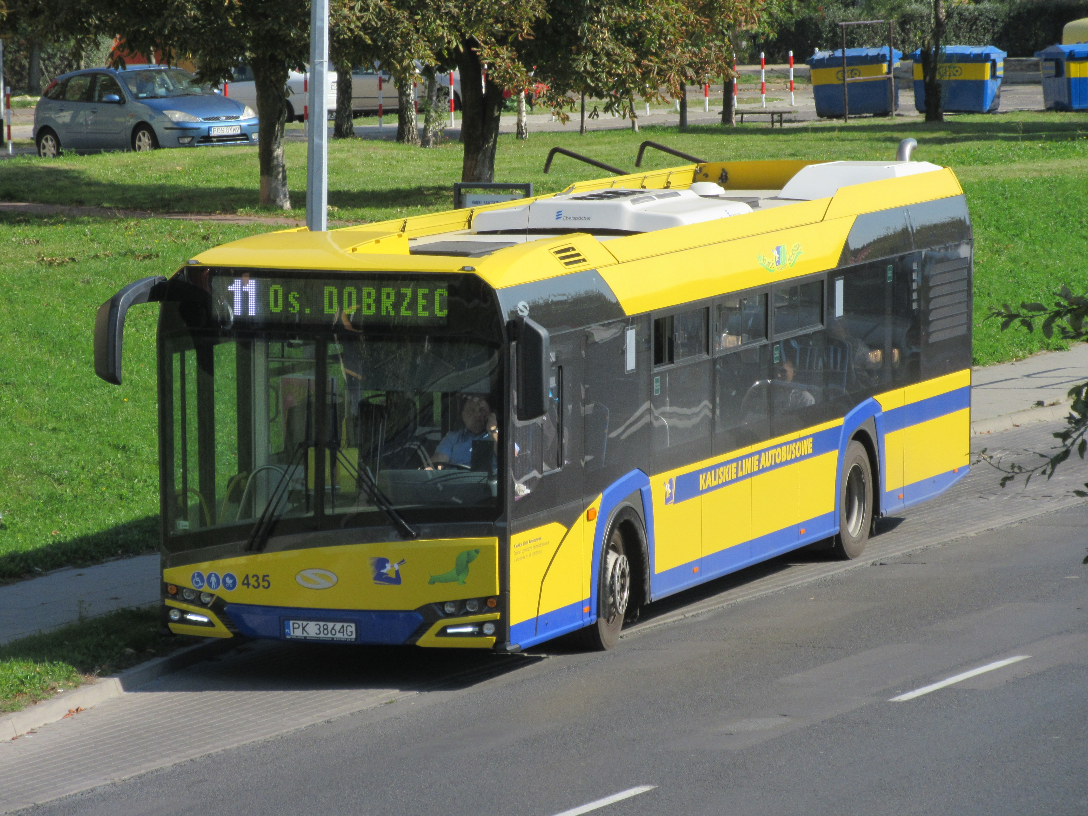 Solaris Urbino 12 Kaliskich Linii Autobusowych na przystanku Wyszyńskiego Arena w Kaliszu